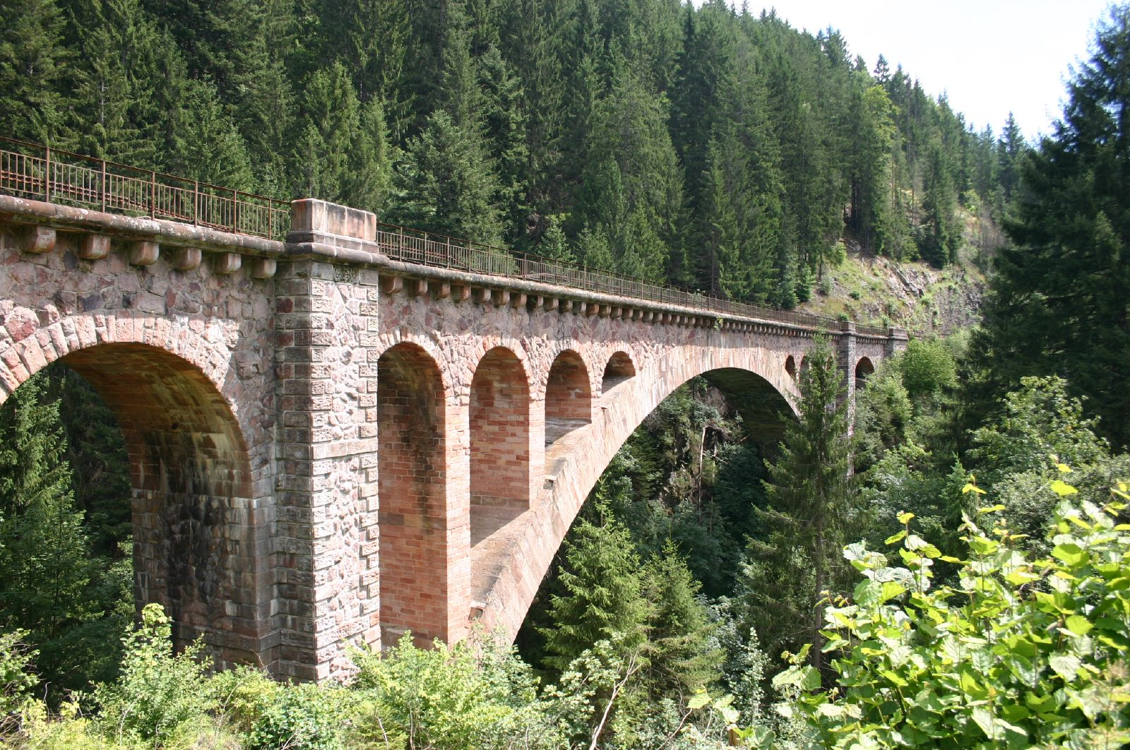 Wutach-Wanderung August 2005 Black forest